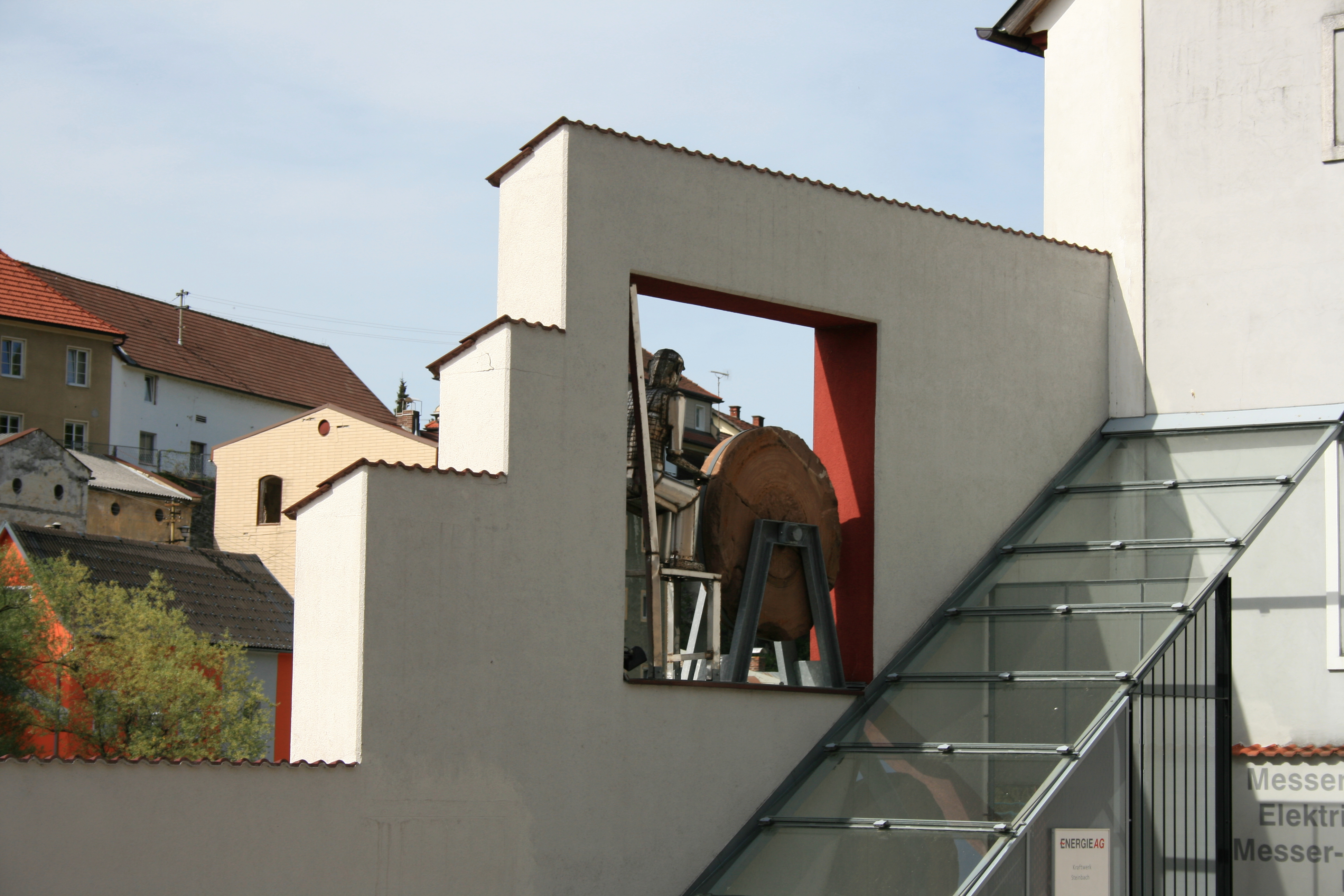 Skulptur am Messerermuseum in Steinbach an der Steyr. Die Häuser im Hintergrund gehören zu Grünburg